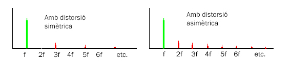 Defineix visualment la simetria de la distorsió